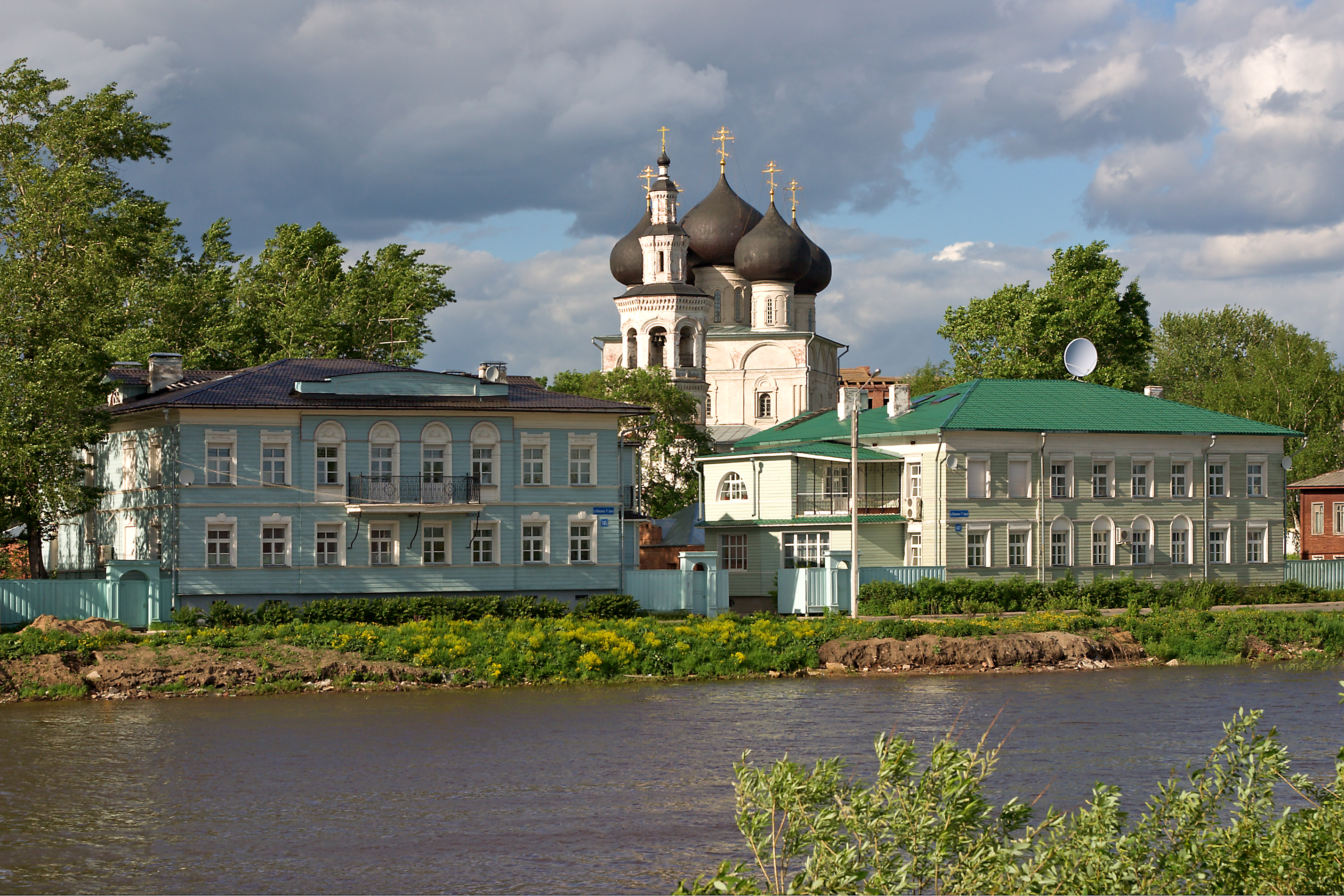 Вологда. Дома на Набережной VI арммии и церковь Никольская "во Владычной слободе"